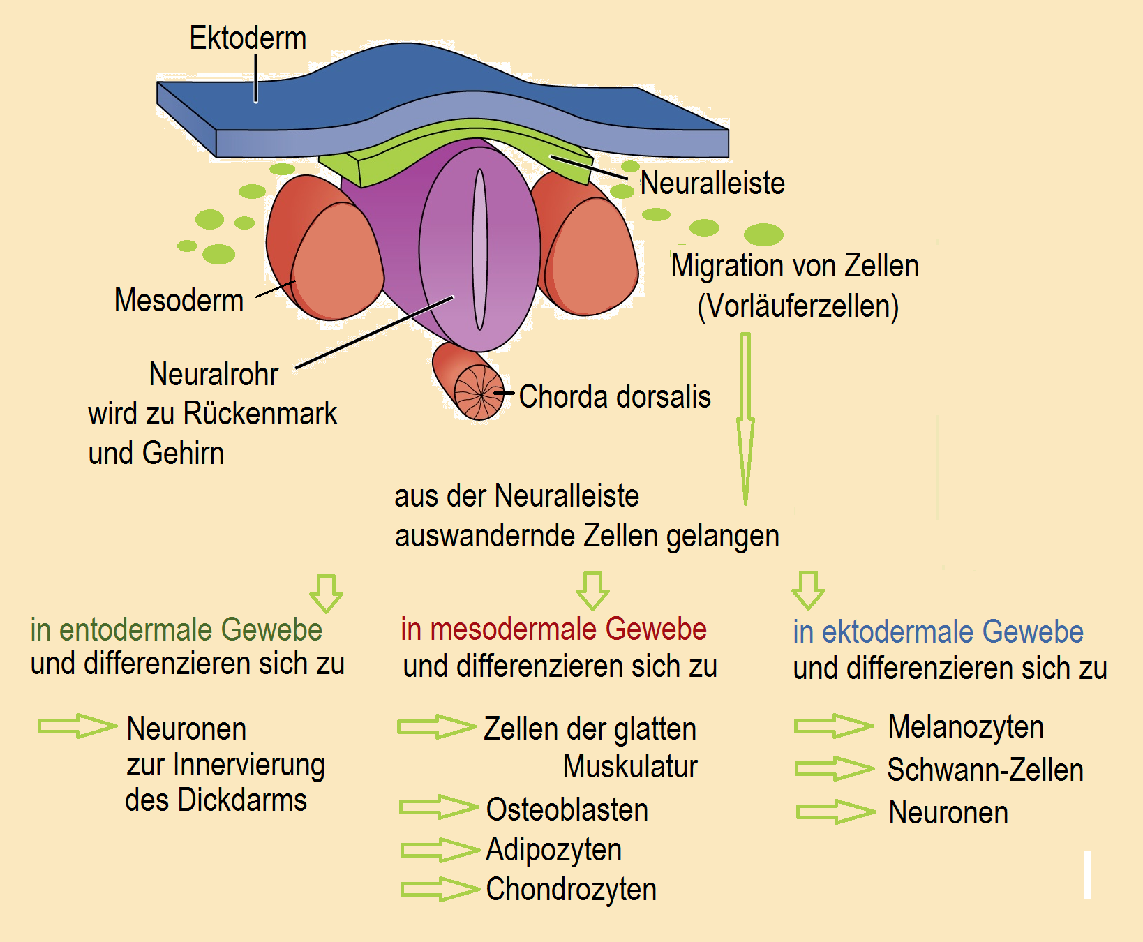 Neuralleiste: Migration der Zellen